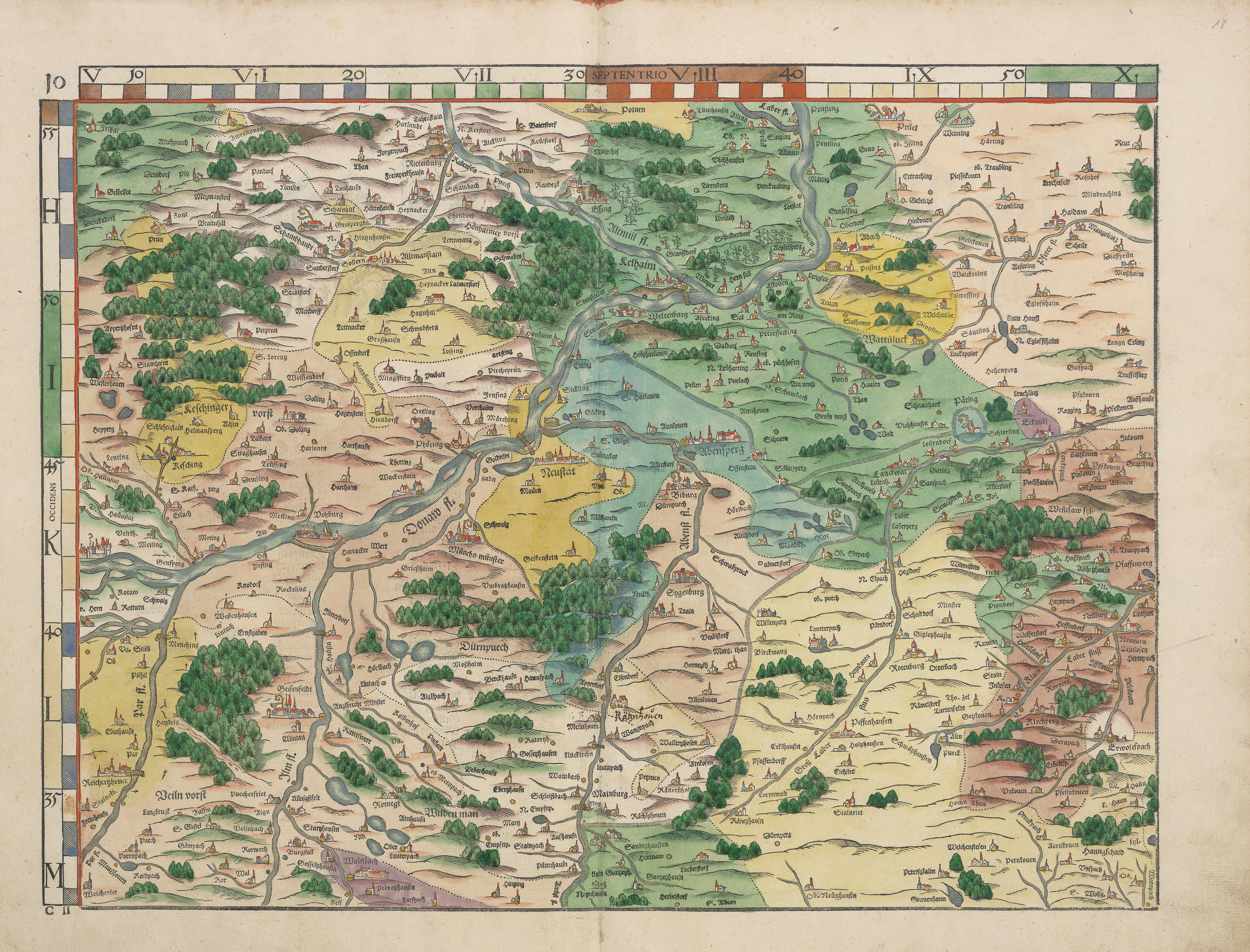 Philipp Apian - Bairische Landtafeln von 1568 (Tafel 10) ca. 1:140.000, Gesamtgröße des Originals 156 x 159 cm, je Blatt 43 x 33 cm Auf der Basis der „Großen Karte“ ließ Philipp Apian 1566 von Jost Amman Holzschnitte im kleineren Maßstab von 1:144.000 anfertigen. Diese so genannten Bairischen Landtafeln, aufgeteilt in 24 Holzschnitte, verlegte Apian in seiner eigenen Druckerei. Die Genauigkeit der Landkarten wurde erst im 19. Jahrhundert übertroffen. Noch Napoleon benutzte sie für den Einmarsch in Bayern. Ein Originaldruck der Karte ist im Stadtmuseum Ingolstadt ausgestellt, die Druckstöcke befinden sich heute im Bayerischen Nationalmuseum in München. Abraham Ortelius verbreitete kolorierte Kupferstiche dieser Landtafeln in Buchform „ex tabula Philippi Apiani“.